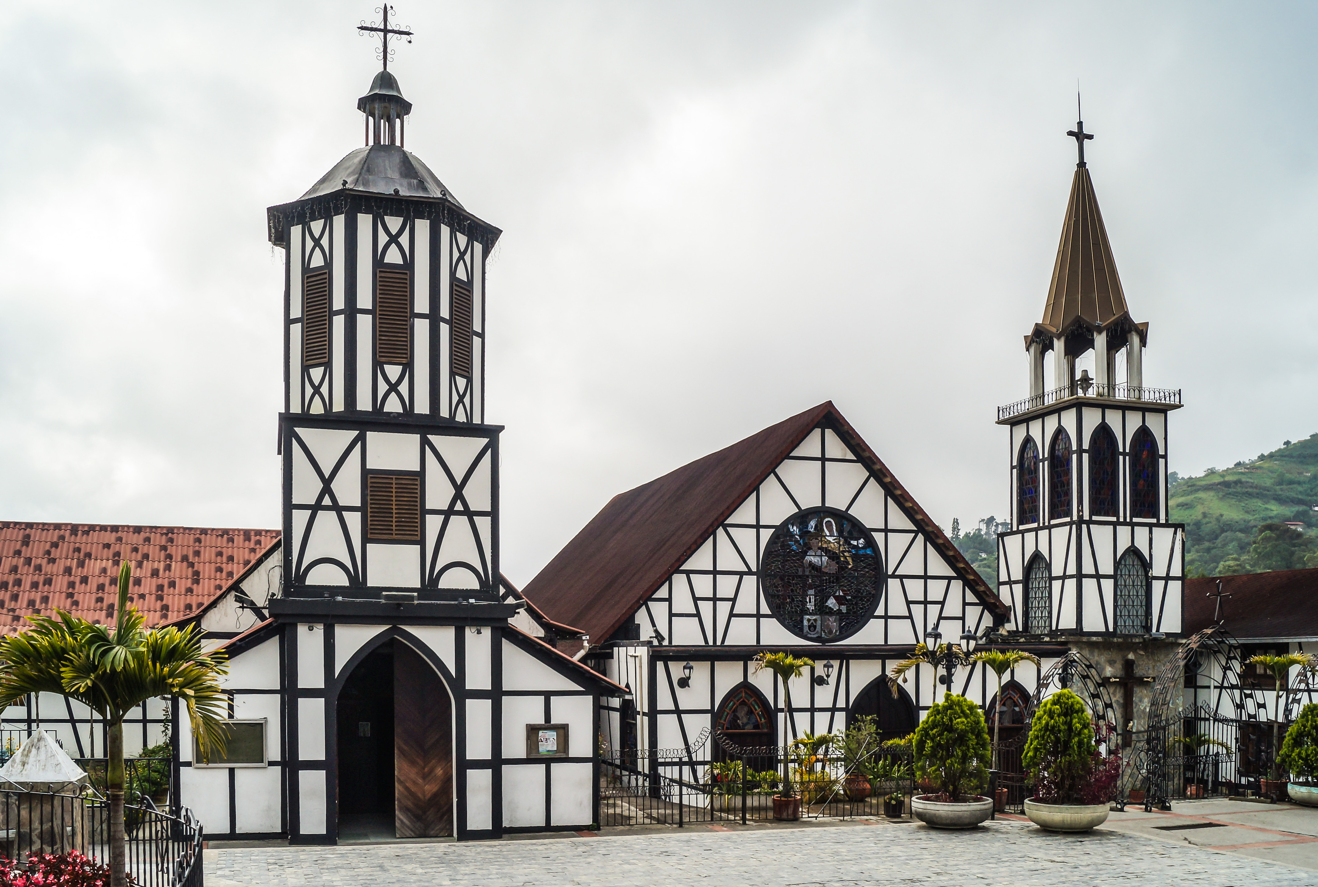 El 28 de agosto de 1843 fue consagrada a San Martin de Tours la primera iglesia de la Colonia Tovar. Había sido construída por los colonos en solo cuatro meses desde su llegada. Tenía una estructura de madera, paredes de bahareque y techo de palmiche. Colocarón en ella la imagen de San Martin que trajeron de Endingen, Kaiserstuhl. En 1862 los colonos construyeron en el mismo sitio una nueva iglesia ya que l original se había deteriorado. Las paredes se levantaron por el sistema de entramado de madera (fachwerk) utilizando ladrillos para rellenarlas. Para la cubierta del techo usaron tejas de madera. Después de algunas remodelaciones realizadas en 1893, es en el año 1918 cuando el padre benedictino Juan Paul Dobbert cambia totalmente la torre campanario construyendo una nueva. En el año 1953 el carpintero Juan Breidenbach y sus hijos construyeron una nueva torre octogonal de madera siguiendo los planos que había preparado Richard Aretz en 1940. En 1957 se construyó la segunda nave, perpendicular a la primera y de acuerdo a los planos de Aretz que recordaban la de Freundestadt en en la Selva Negra alemana. En 1981 se reconstruyó la torre principal en concreto y en 1983 se hizo lo mismo con la otra torre. Fue declarado Monumento Histórico Nacional según Gaceta Oficial no. 35.441 de fecha 15 de abril de 1994. Estado Aragua. Venezuela.